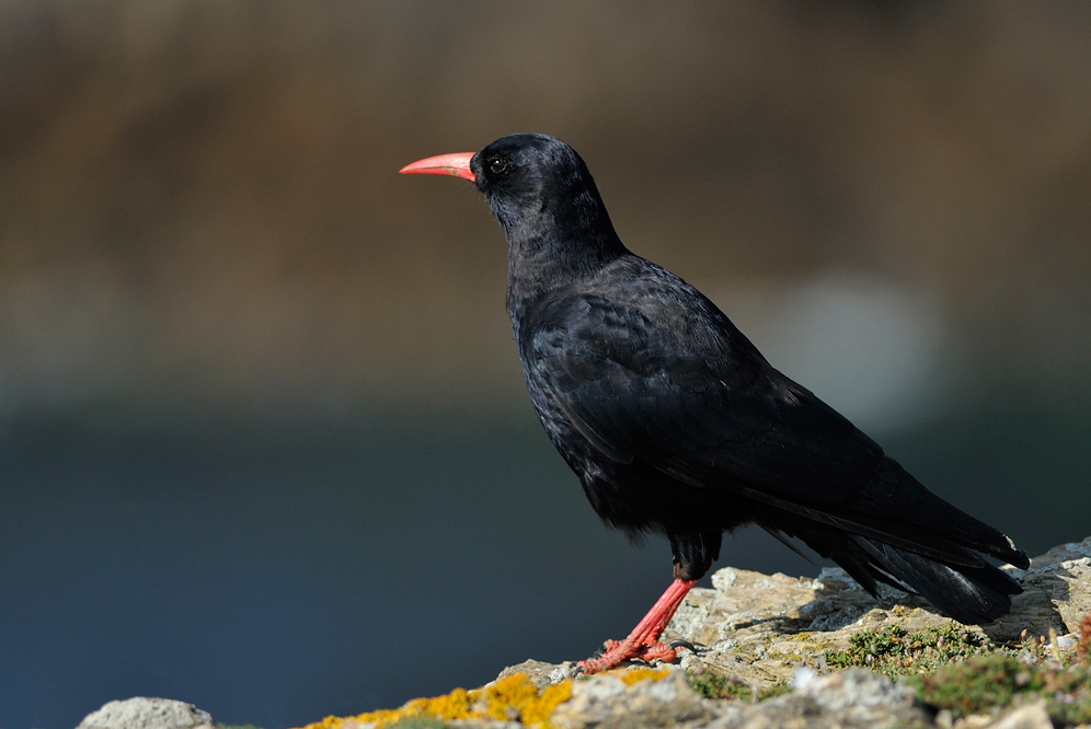 זג אדום-מקור